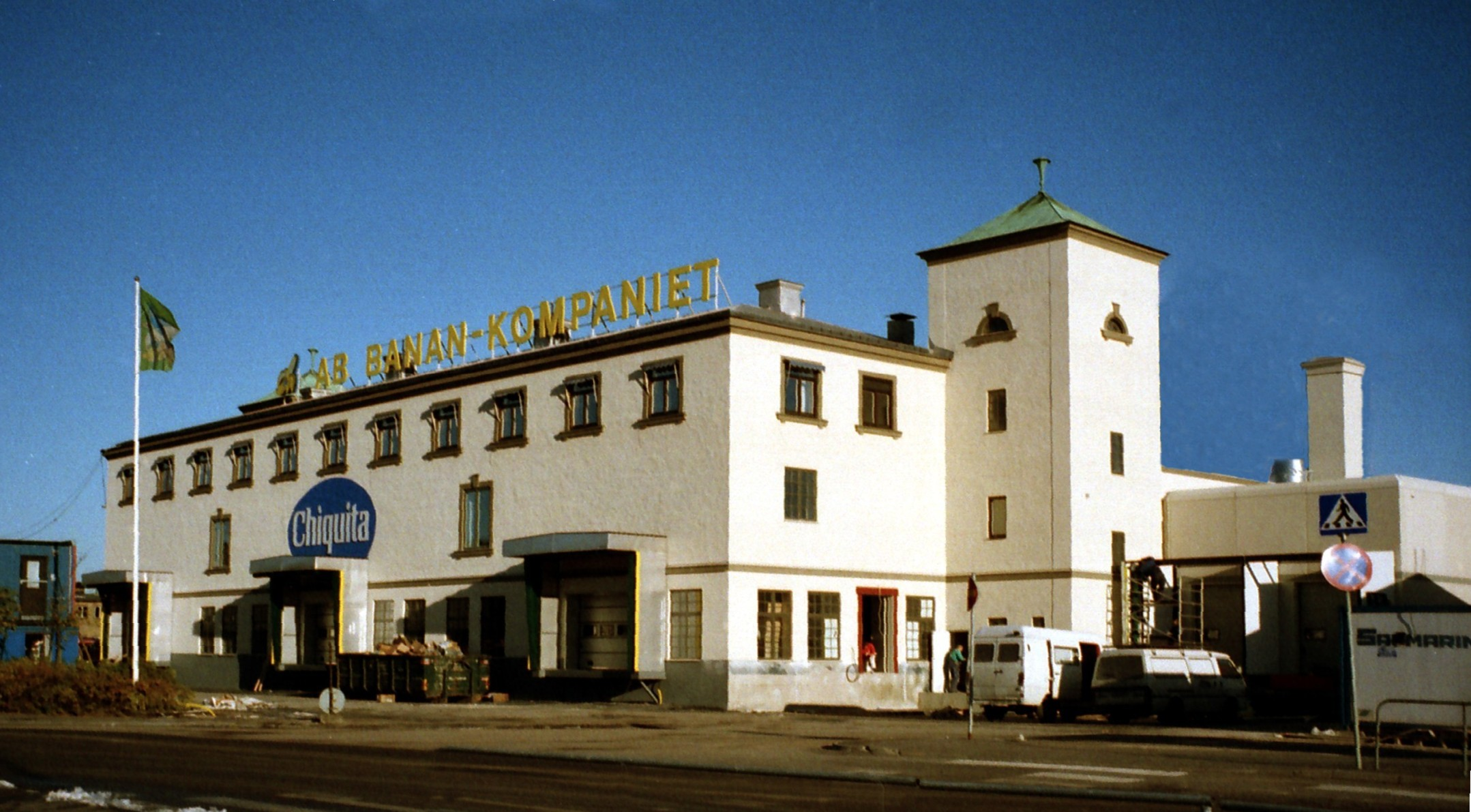 Banan-Kompaniets byggnad i Stockholm 1996